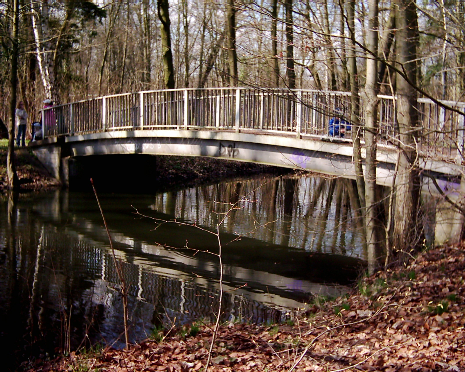 Die Wasser der Panke werden vor dem Pölnitzweg geteilt, im Park selbst erfolgt nochmals ein kleiner Kanal nach links zum östlichen Parkteich und einer nach rechts zum westlichen Parkteich. Beide Teiche werden im Park zusammengeführt und geben ihr Wasser kurz vor dem Ende des Parkes (an der Wiltbergstraße) wieder in die Panke. Der Landschaftspark mit diesen Wassern wurde bereits 1813 angelegt und 1907 geöffnet. Neben den sechs Pankebrücken führen neun schönere Brücken die Parkwege über die Gewässer.